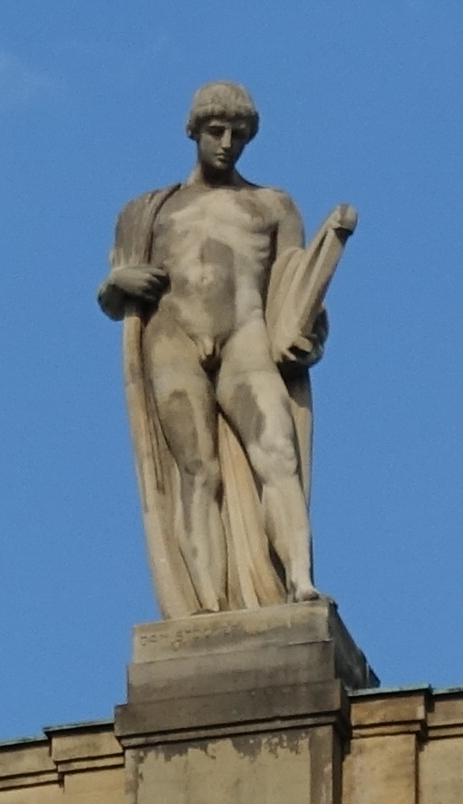 Allegorie der Musik von Daniel Stocker, 8. Attikafigur (von links) auf dem Portikus des Großen Hauses der Staatstheater Stuttgart, 1912.